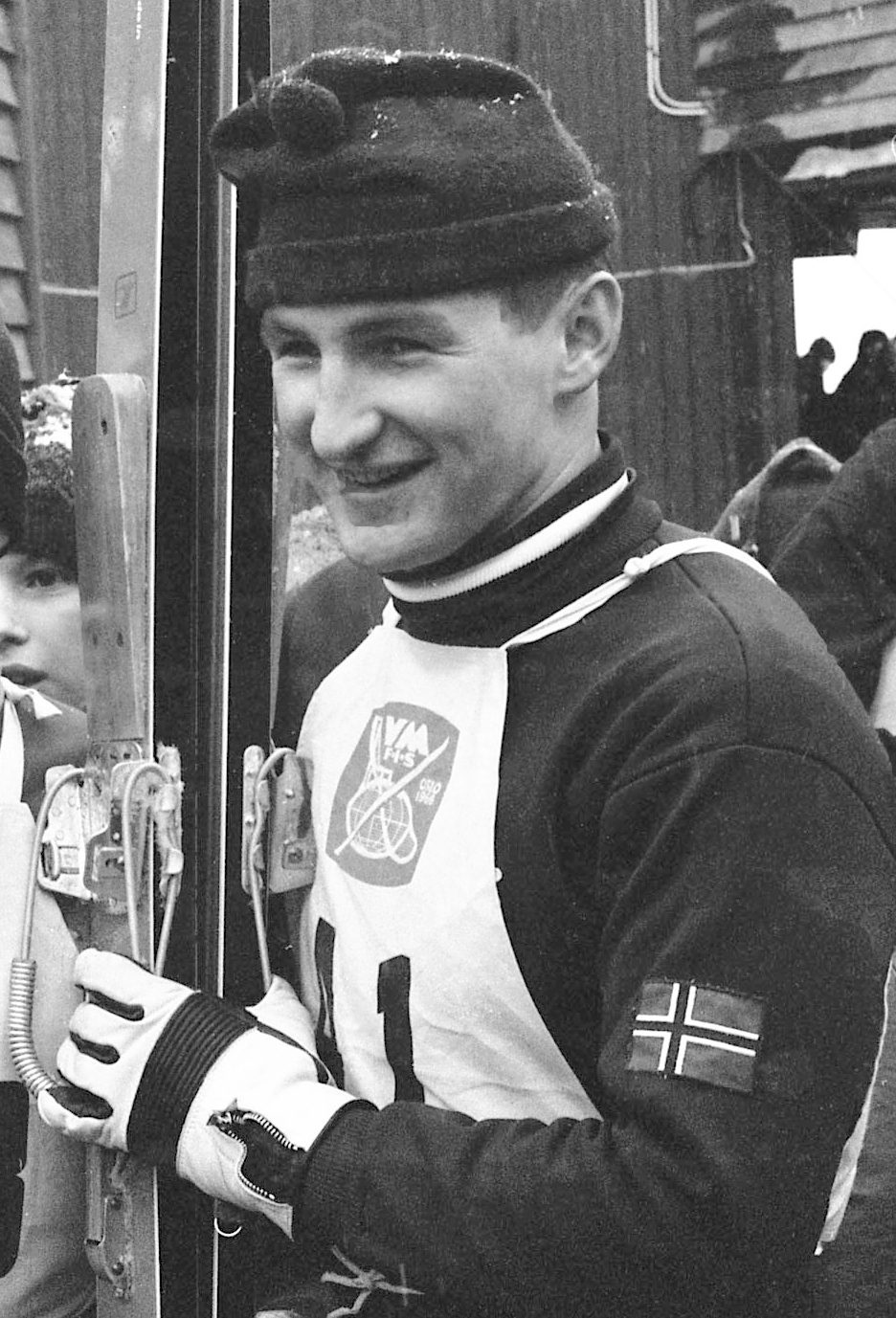 Bjørn Wirkola, Verdensmesterskapet på ski i Oslo 1966. Arkivreferanse: RIKSARKIVET- RA/PA/0797/U/Ua/3894_Lasse_010